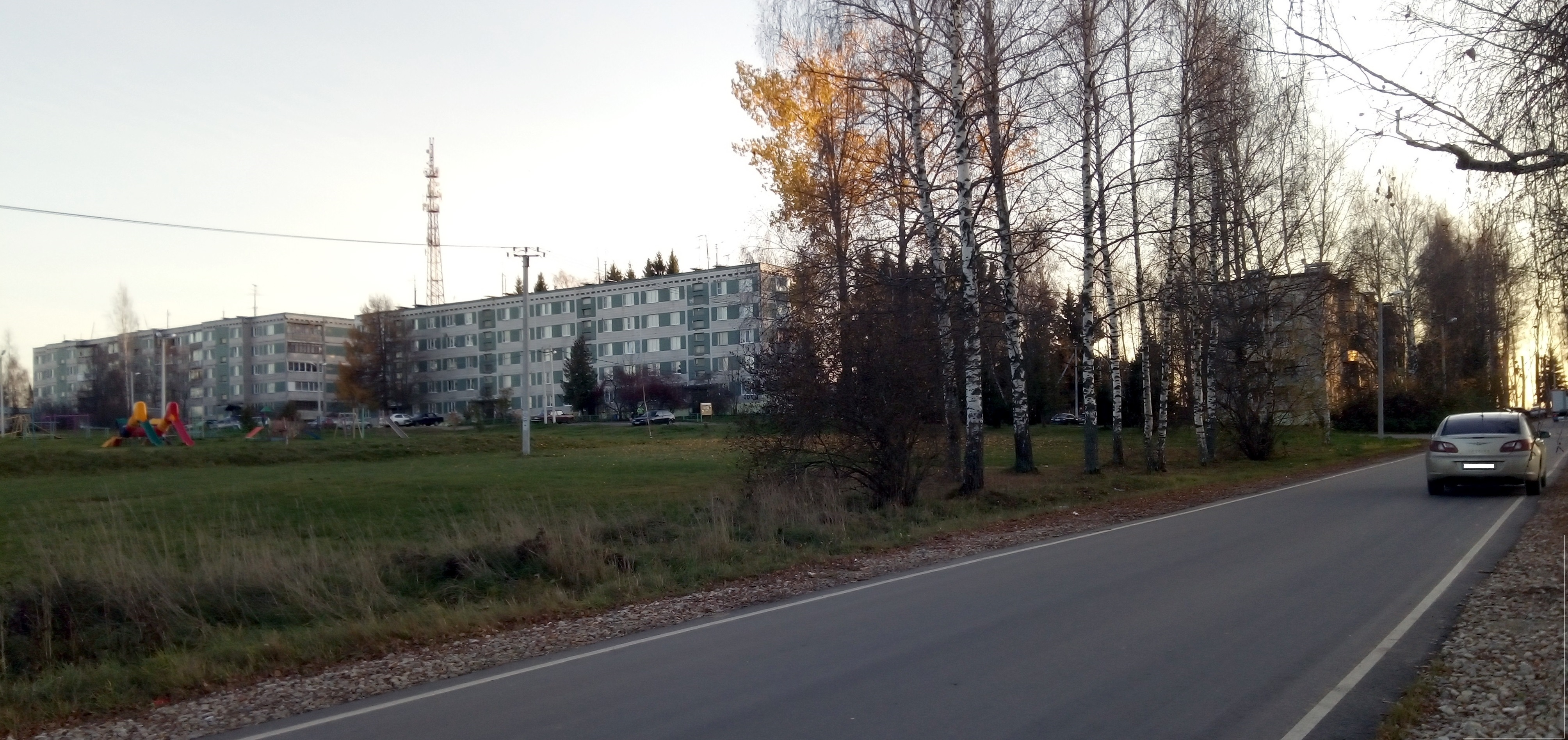 Село Семёновское.